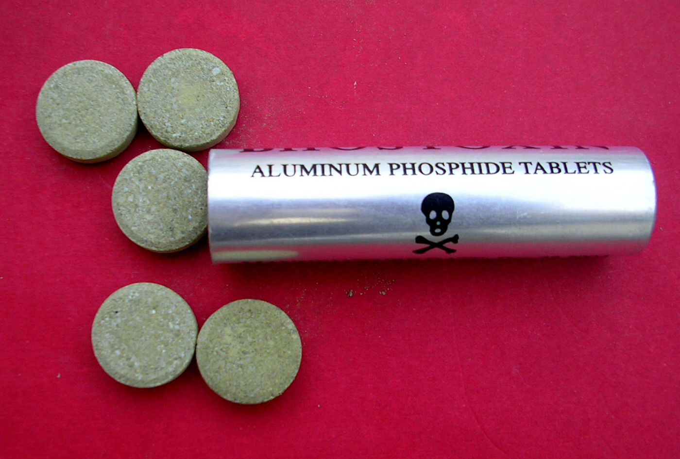 قرص برنج (فسفید آلومینیوم) خریداری شده از داروخانه‌ای در قائمشهر ایران